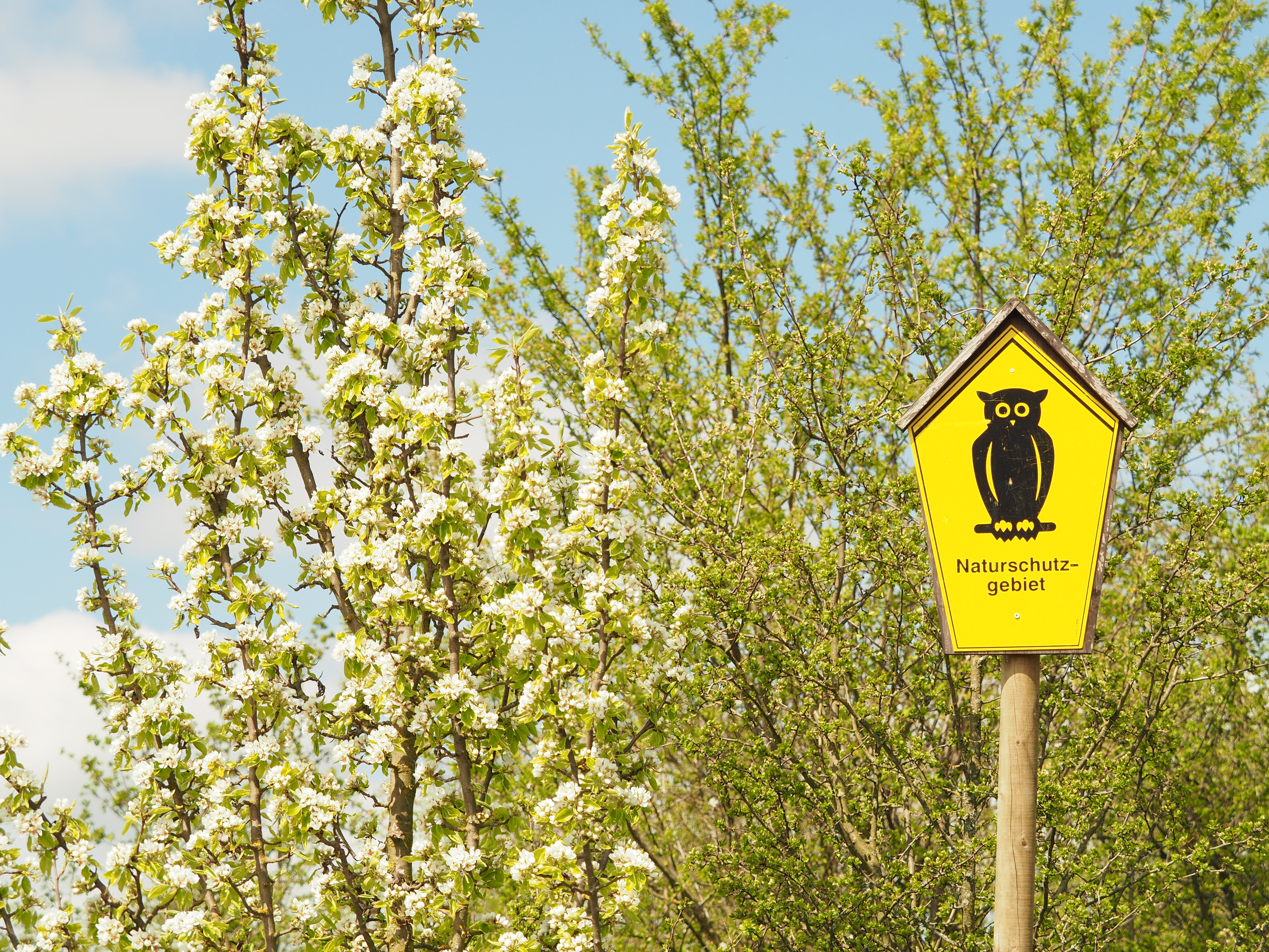 Anfang vom Naturschutzgebiet Südhang Ettersberg